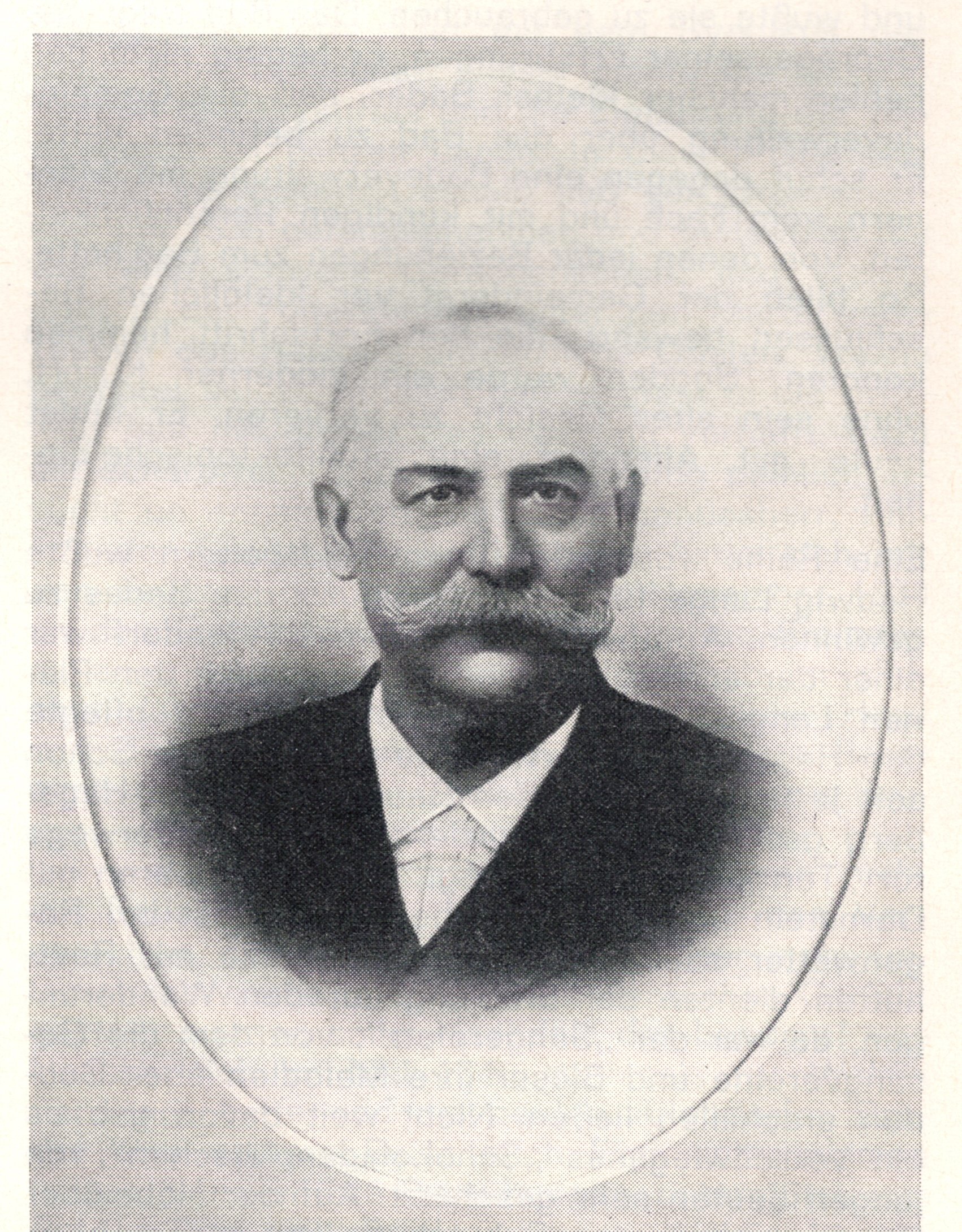 Hedwig Lange, 1876 bis 1901 Bürgermeister von Sooden (heute ein Stadtteil von Bad Sooden-Allendorf)